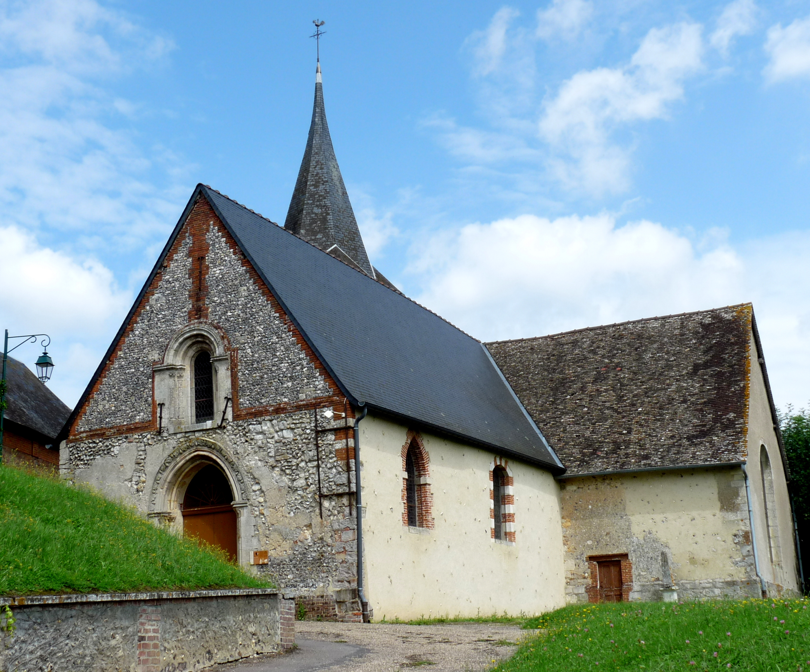 Église Saint-Laurent d'Hébécourt .